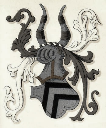 Våbenskjold for slægten Muus til Ullerup